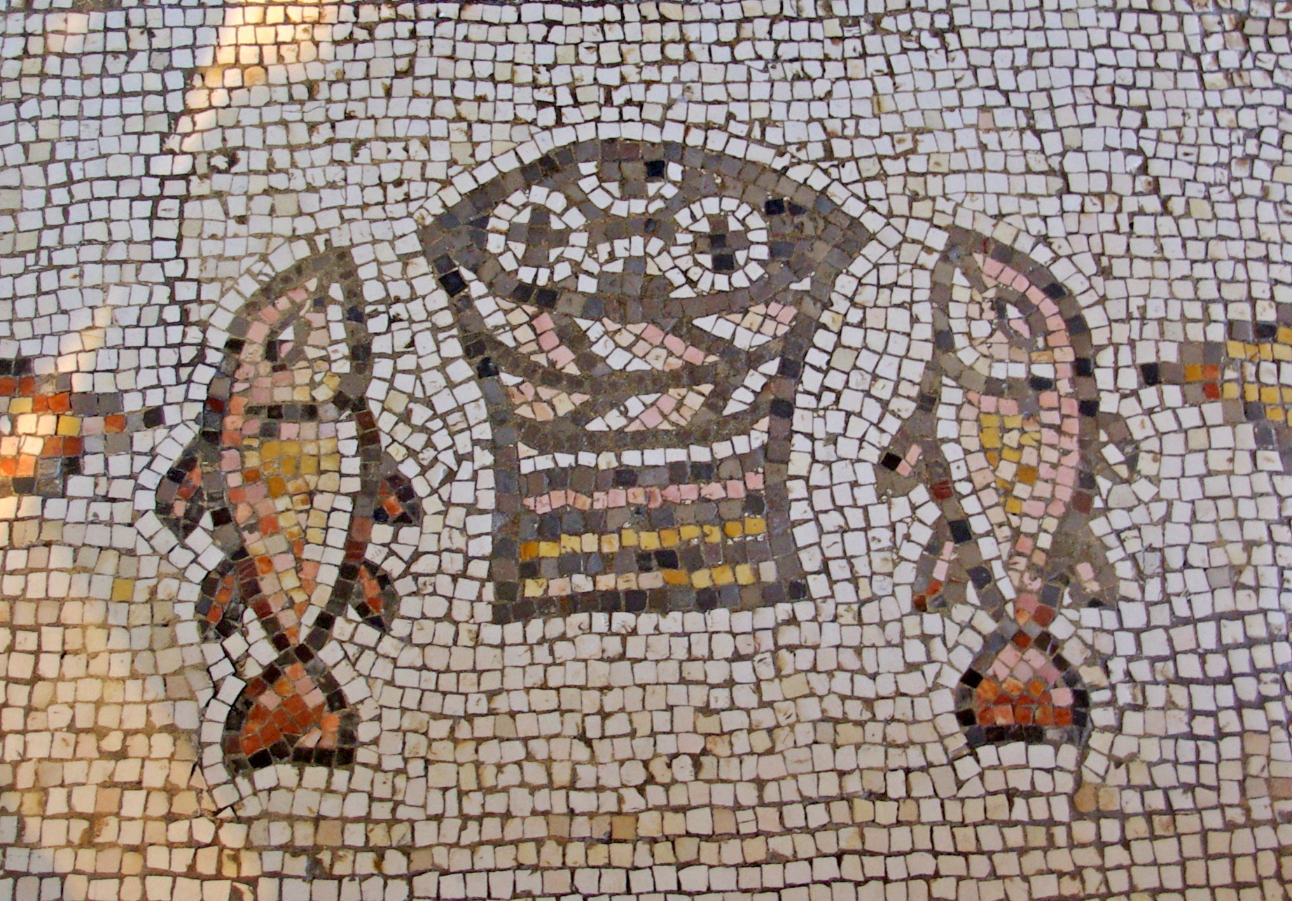 Brotvermehrungskirche in Tabgha, Mosaik: vier Brote und zwei Fische